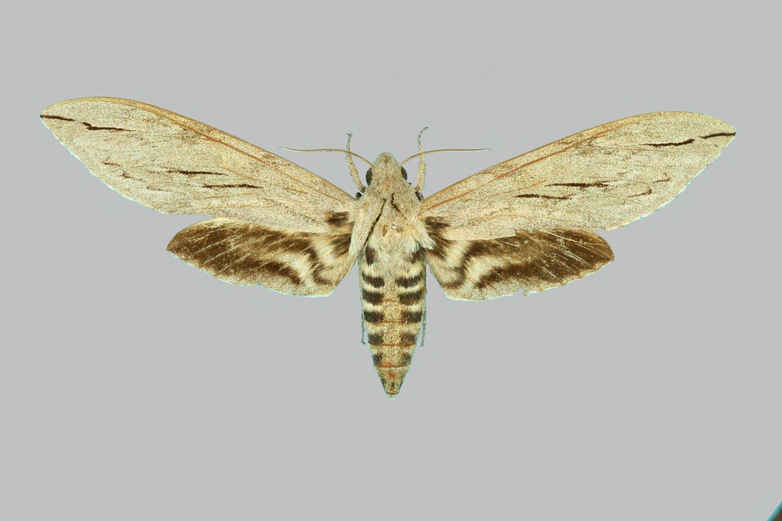 Sphinx leucophaeata, female, upperside. Mexico, Jalapa